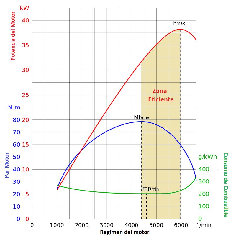 Esquema de curva par-velocidad de un motor de combustion, potencia maxima, par motor maximo, consumo de combustible minimo, zona eficiente